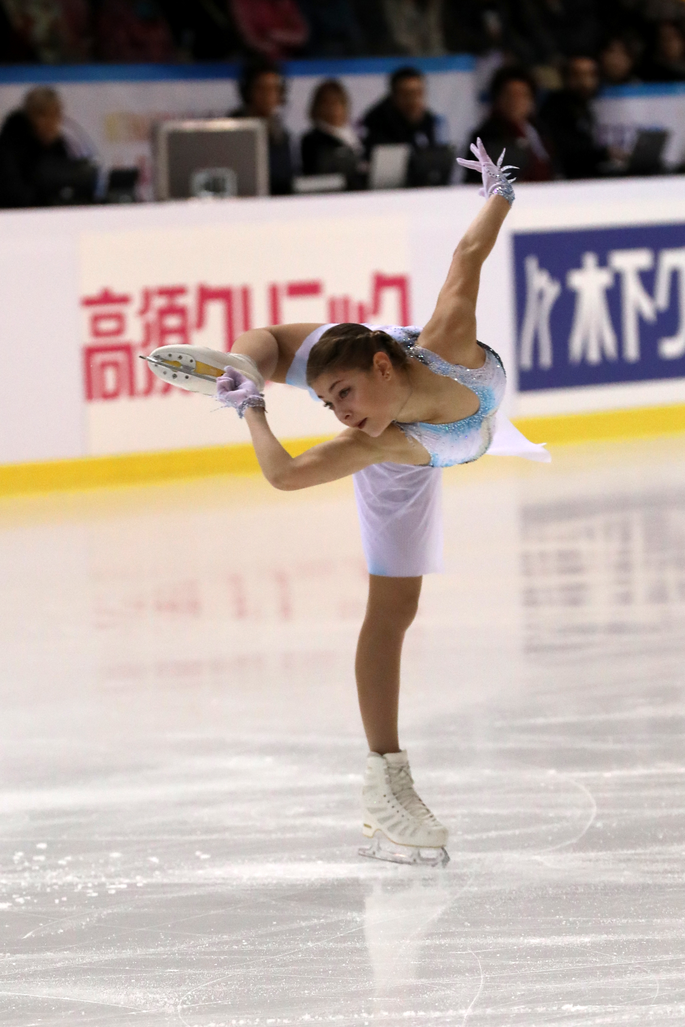 Alena Kostornaia pendant le programme court des Internationaux de France 2019.